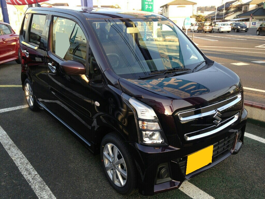 スズキ・ワゴンＲスティングレーＬ